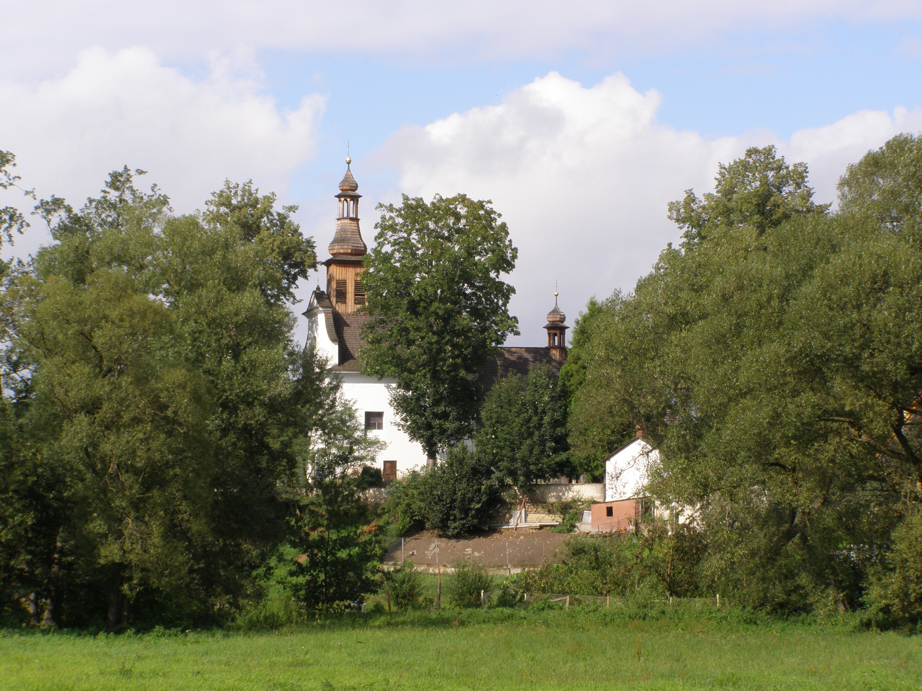 Kostelec, kostel sv. Kunhuty